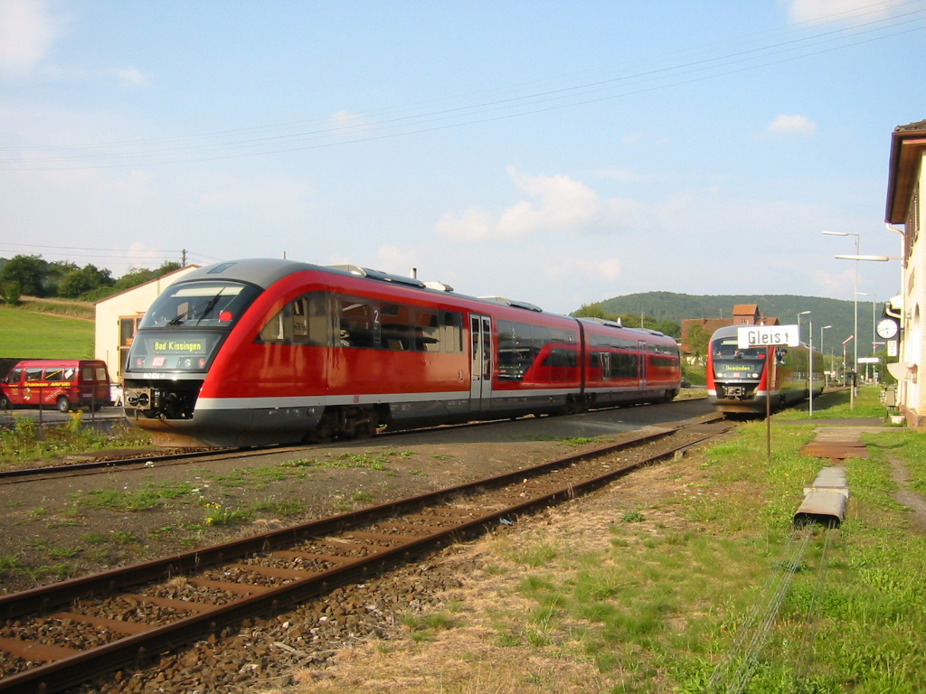 Baureihe 642.